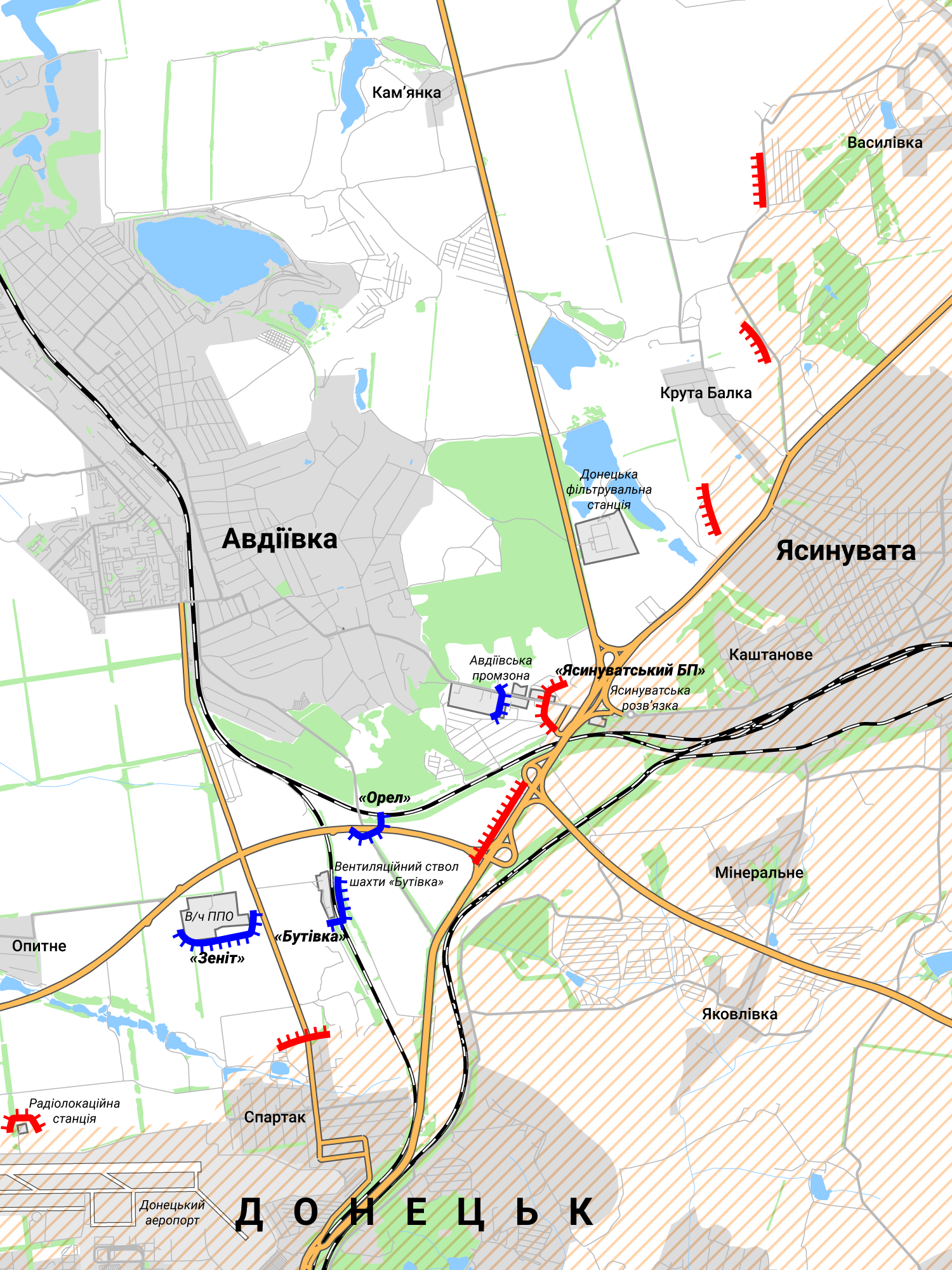 Ситуація на лінії зіткнення в районі Авдіїка-Донецьк-Ясинувата в 2017 році.